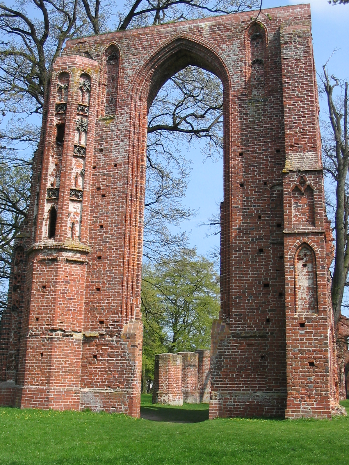 Klosterruine Eldena nahe Greifswald: Kirchenschiff von Westen